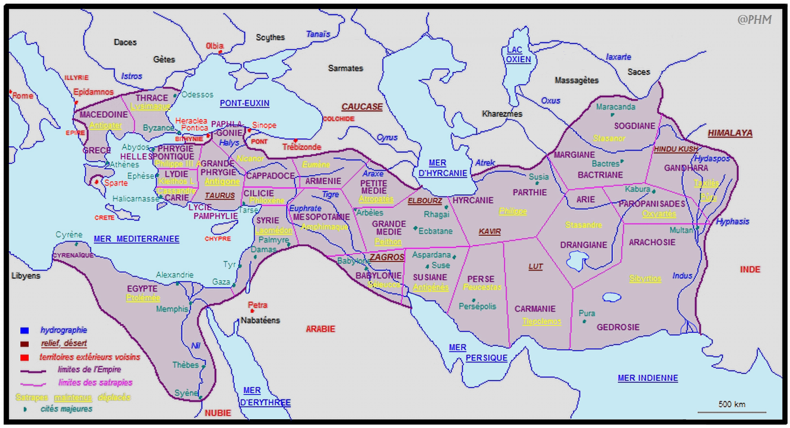 Carte qui représente le découpage et la répartition des différentes statrapies après les accords de Triparadisos